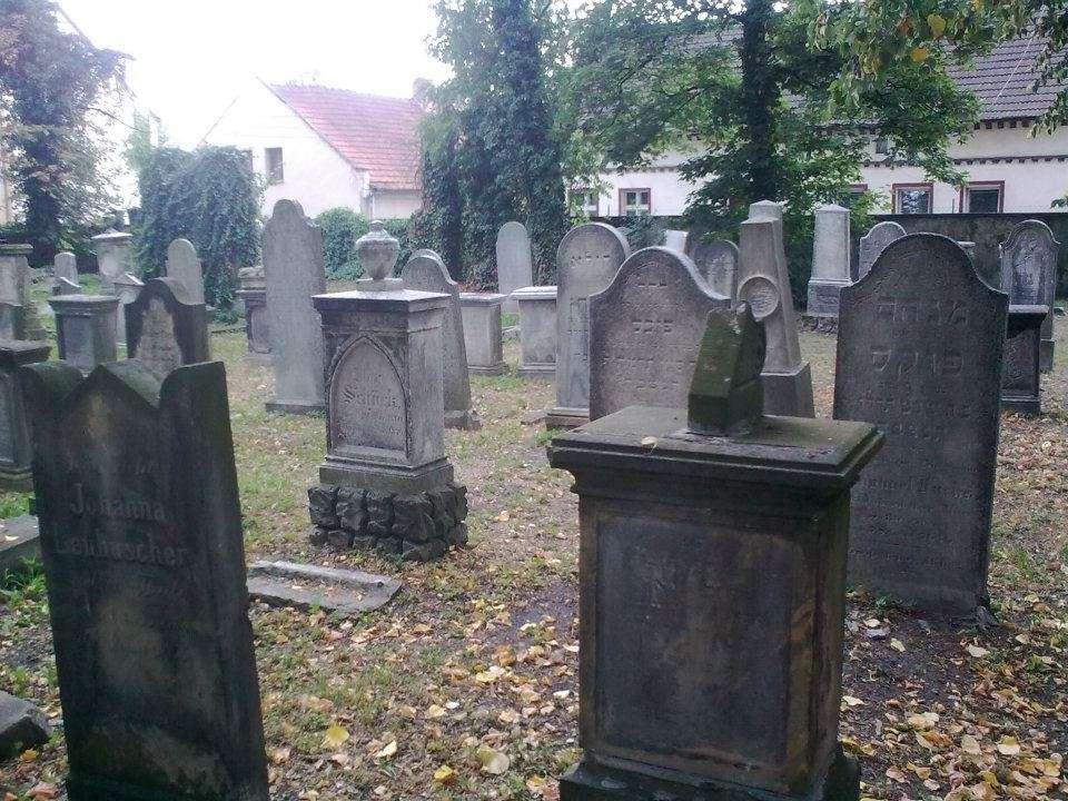 Macewy na cmentarzu żydowskim w Opolu